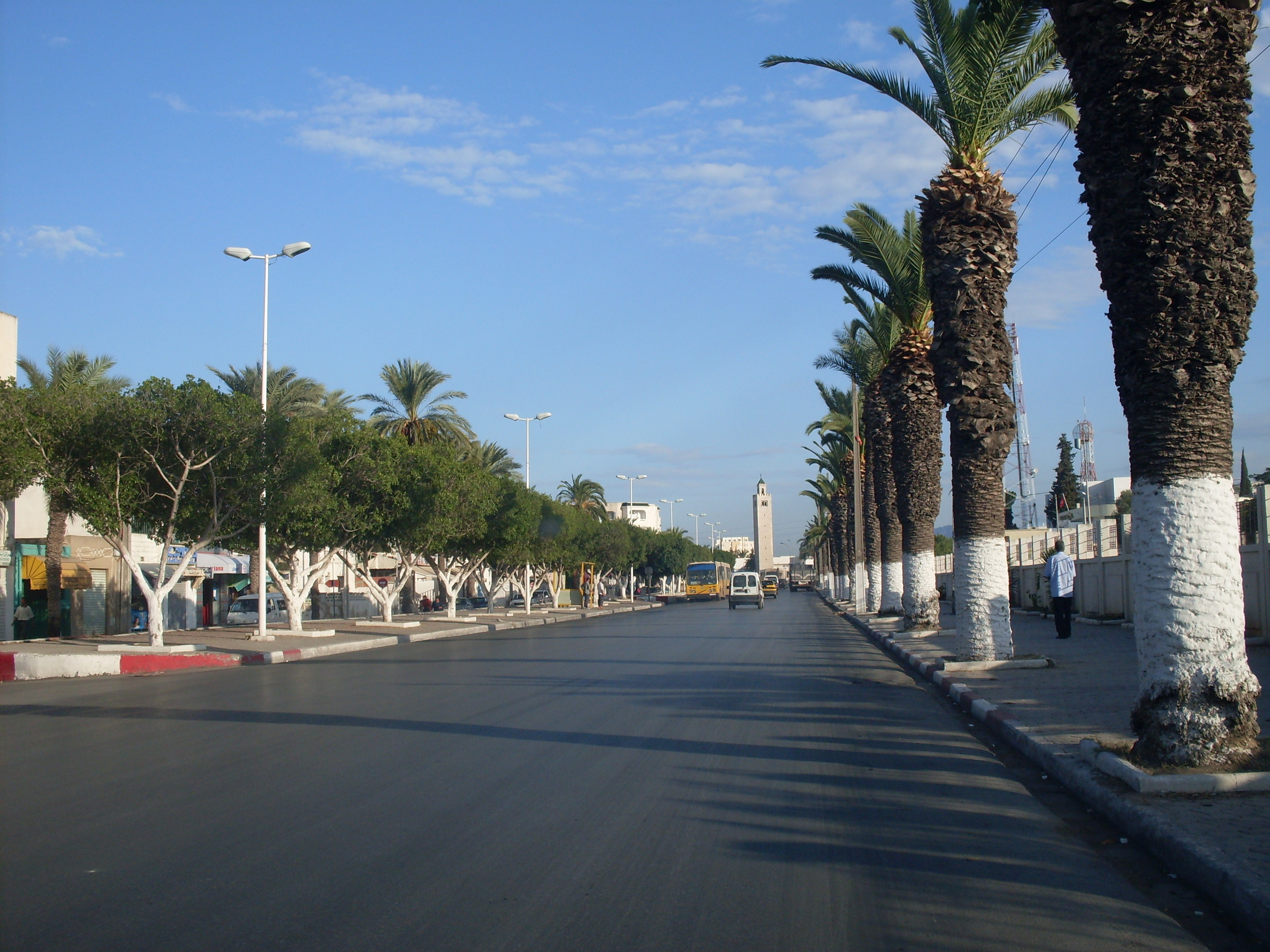 Avenue principale de la ville de Ben Arous parallèle aux chemin de fer